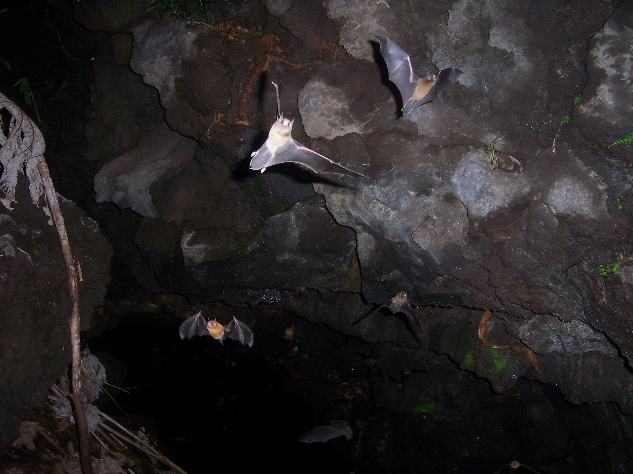 Rats penats al parc nacional del volcà Masaya